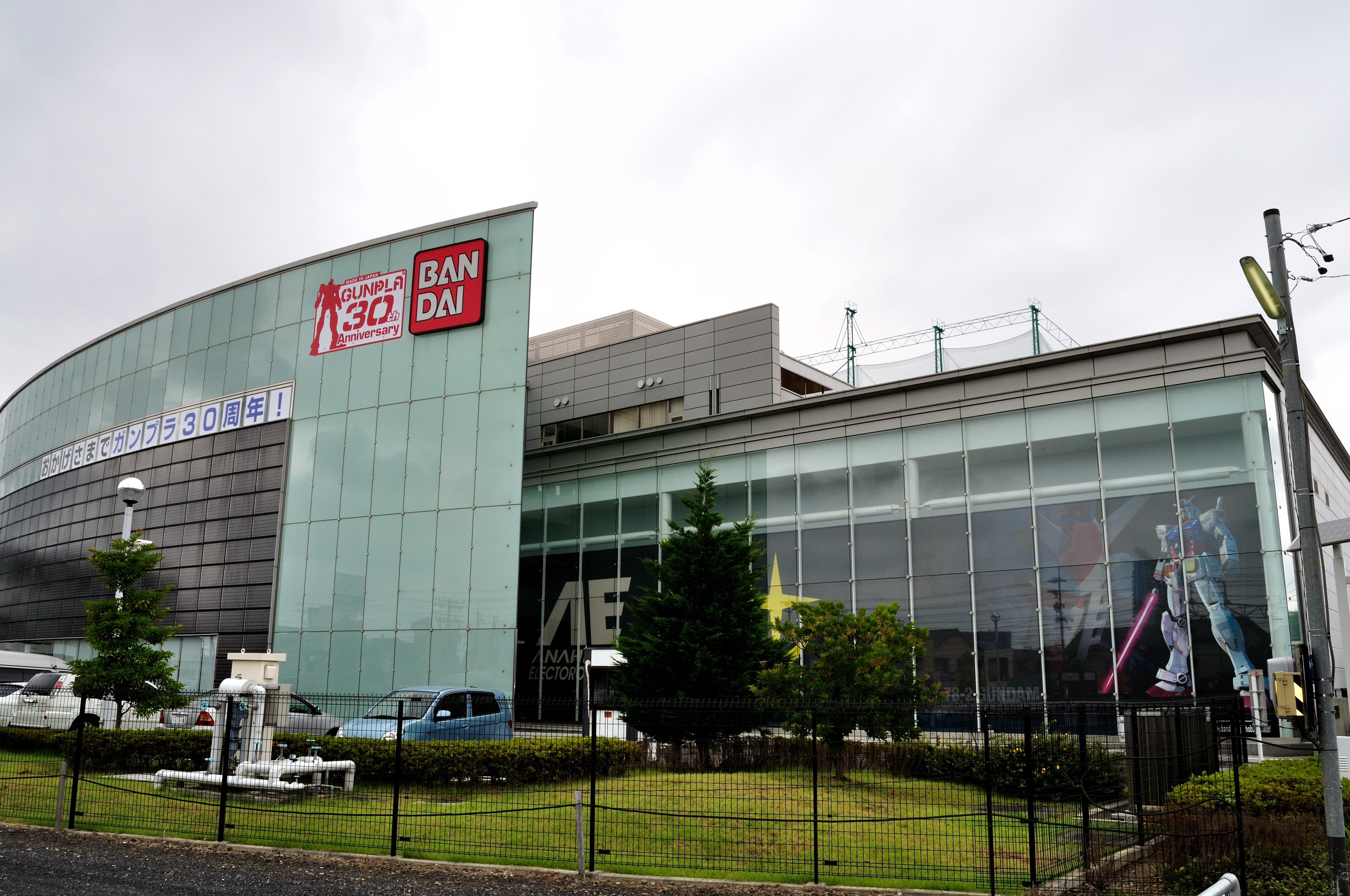 BANDAI Hobby Center バンダイホビーセンター